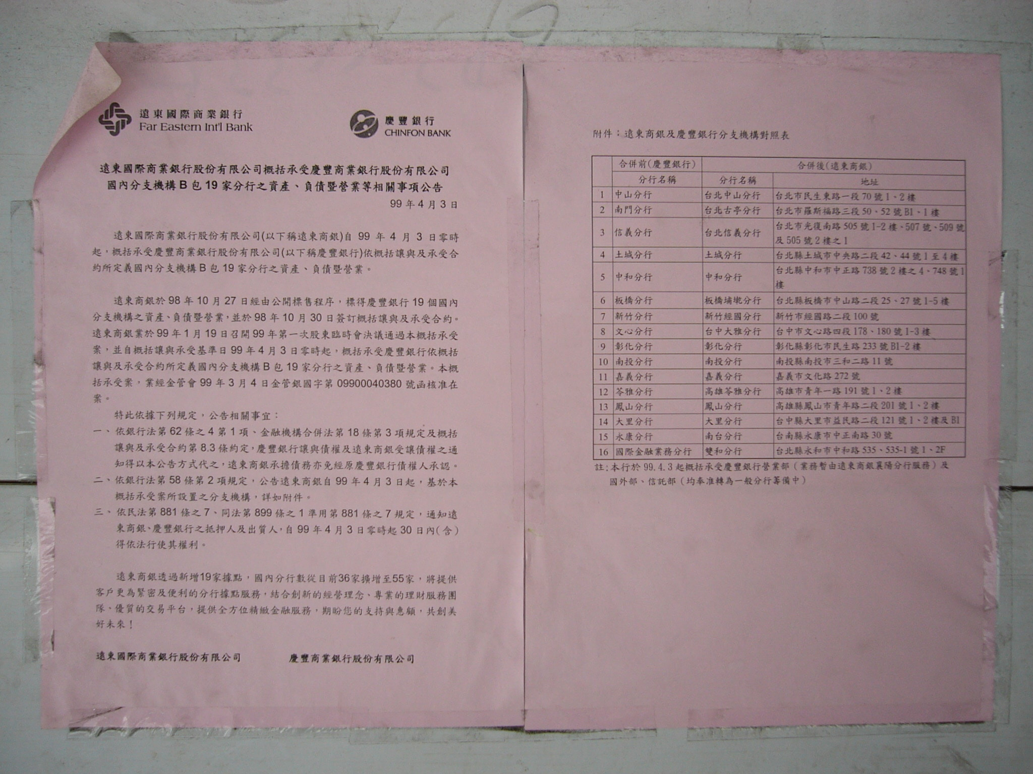 2010年4月3日，遠東國際商業銀行概括承受慶豐商業銀行國內19家分行之資產、負債及營業。